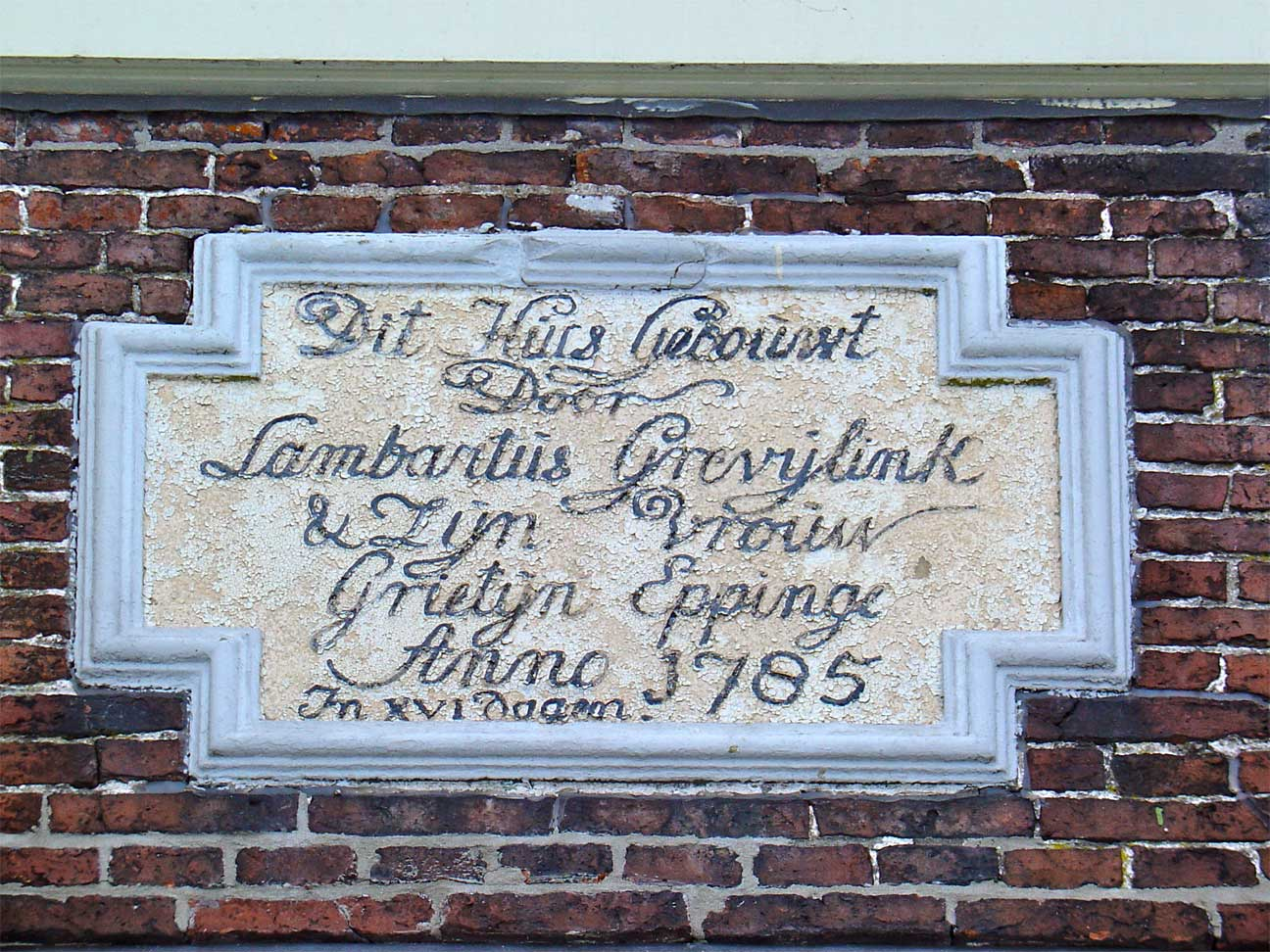 Gevelsteen van het Grevijlinkhuis in Annerveenschekanaal